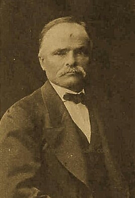 Jean-Baptiste André Guillot (1827-1893), dit Guillot fils, rosiériste français.